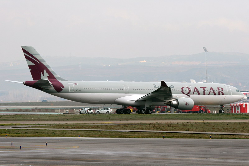 El Airbus A330-300 de Qatar Airways en Barajas